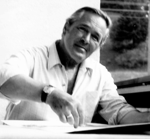 Helmuth Ellgaard in Bad Tölz 1972